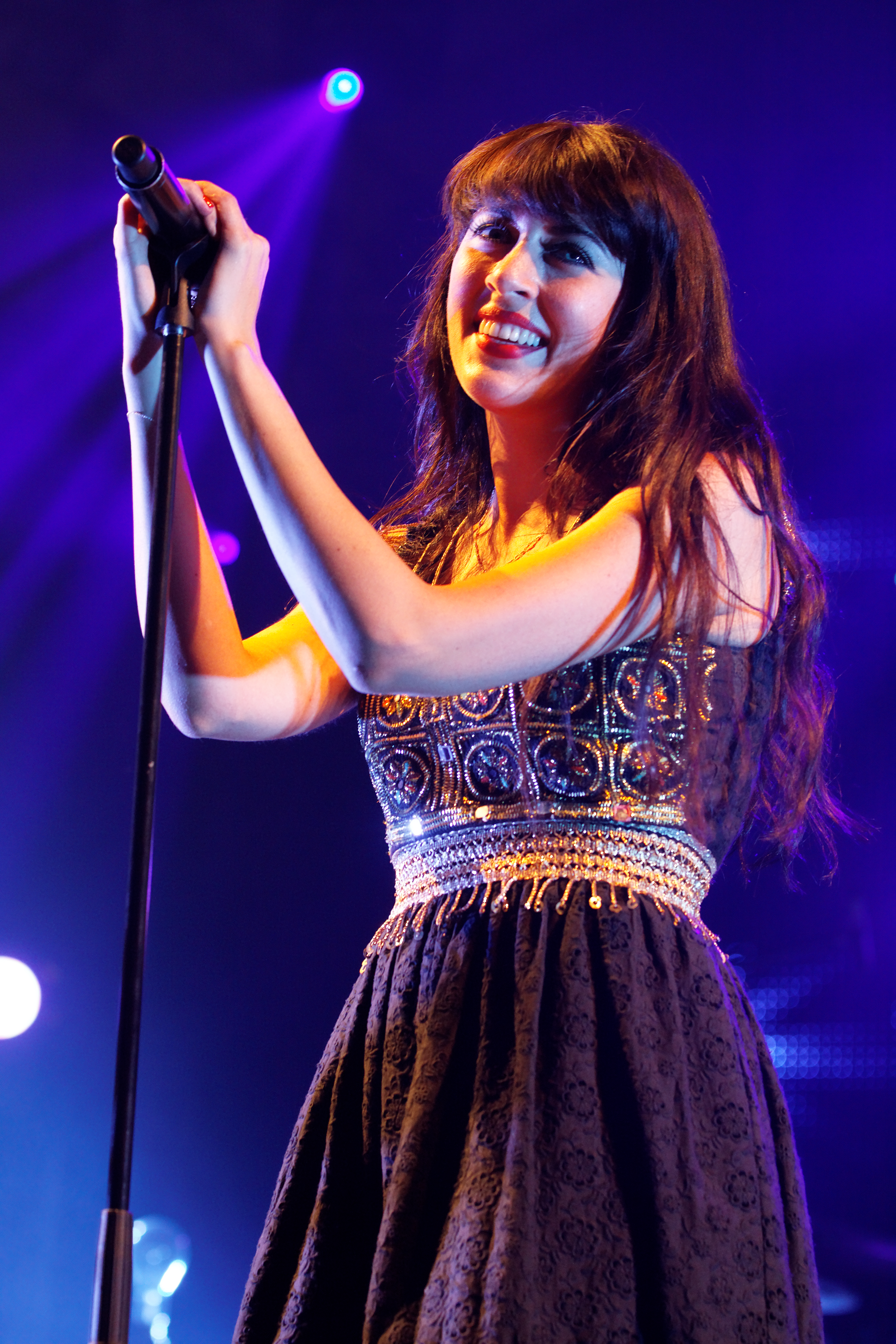 Nolwenn Leroy en concert le 22 juillet lors du festival de Cornouaille 2011.